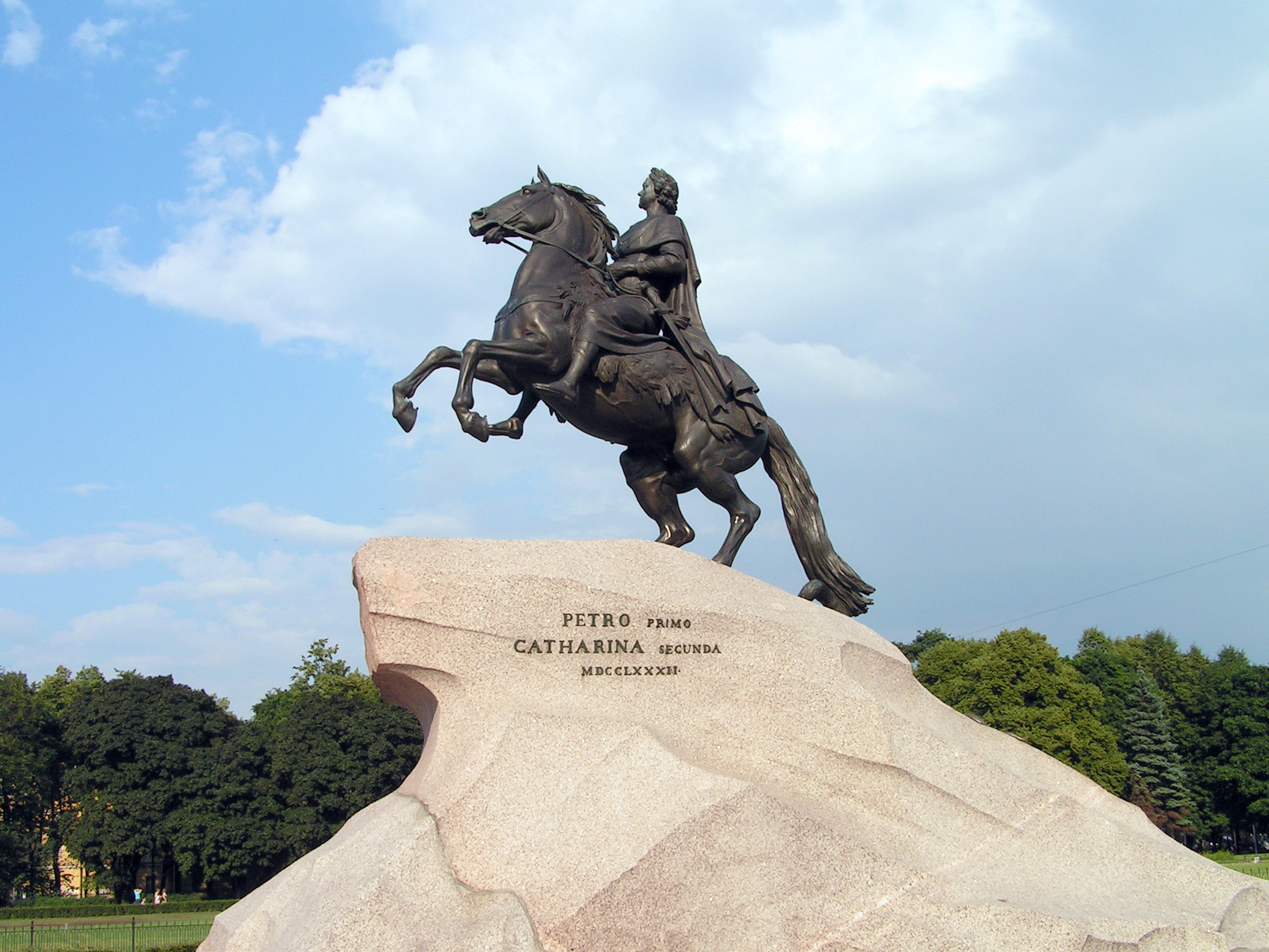 Памятник императору Петру I ("Медный всадник"): площадь Декабристов, Адмиралтейский район, Санкт-Петербург